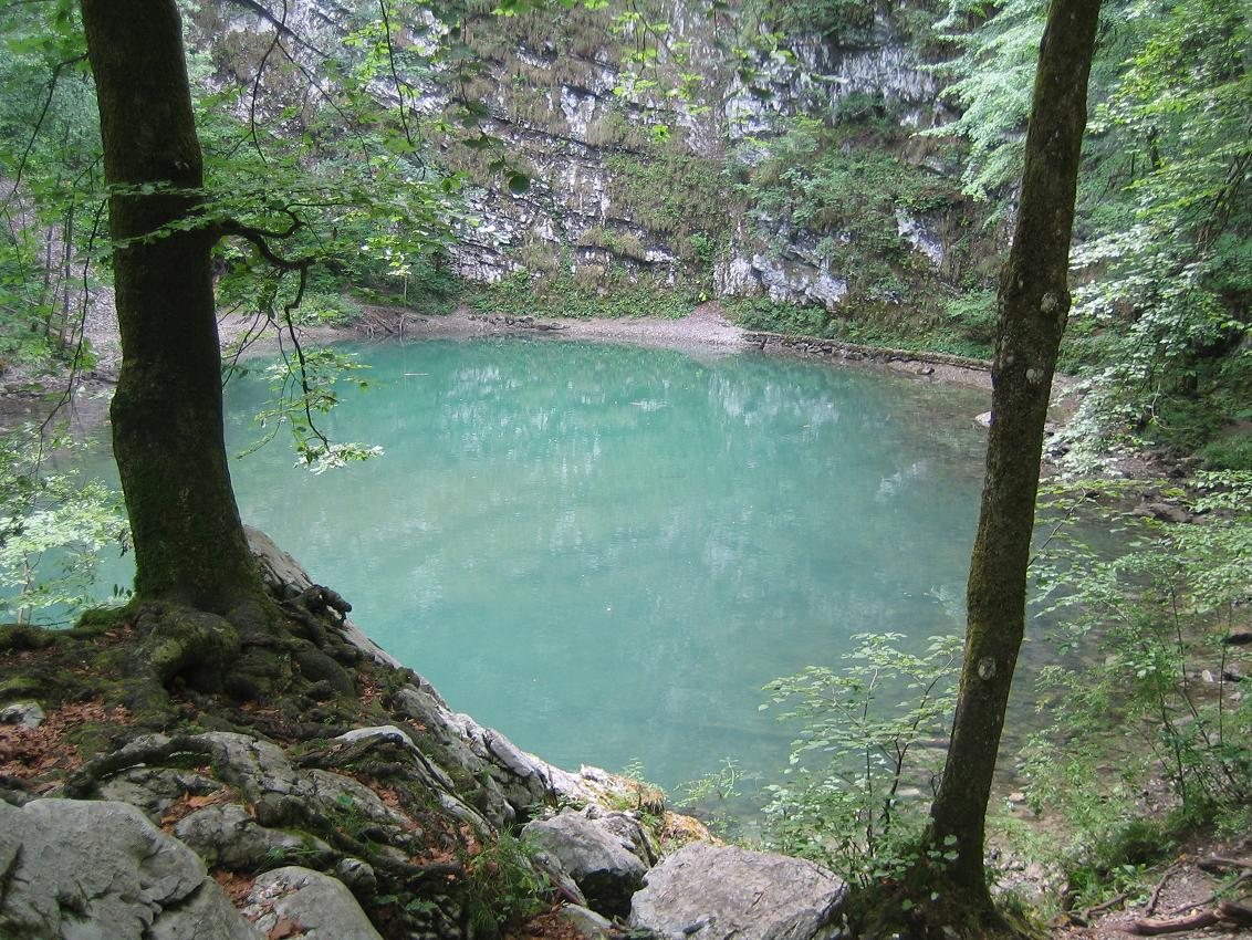 "Wild lake", Divje jezero. A karst spring near Idrija, Slovenia. photo:Ziga 06:59, 12 August 2006 (UTC)